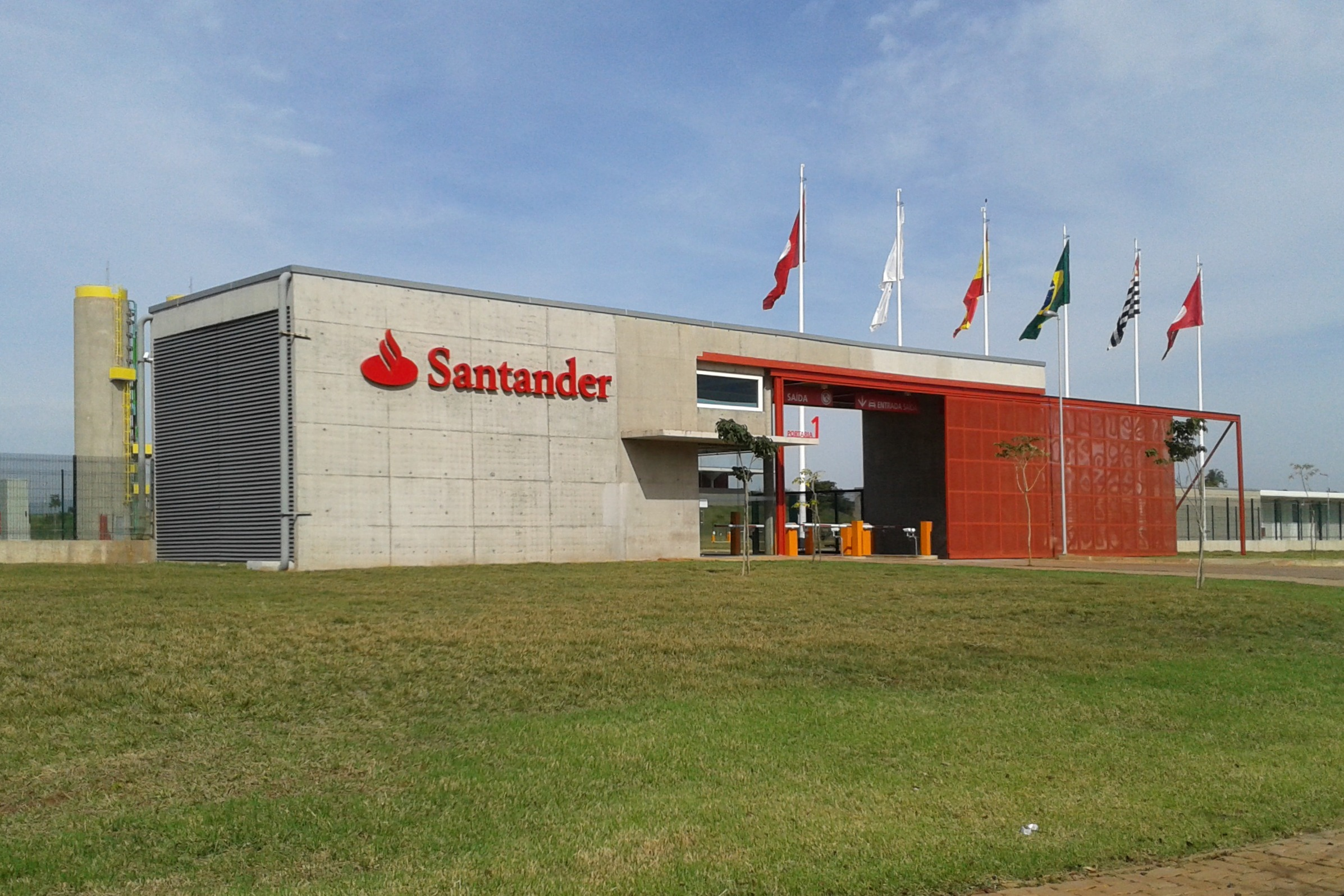 Datacentro localizado na Rua Giuseppe Máximo Scolfaro, no Distrito de Barão Geraldo, Município de Campinas, São Paulo.